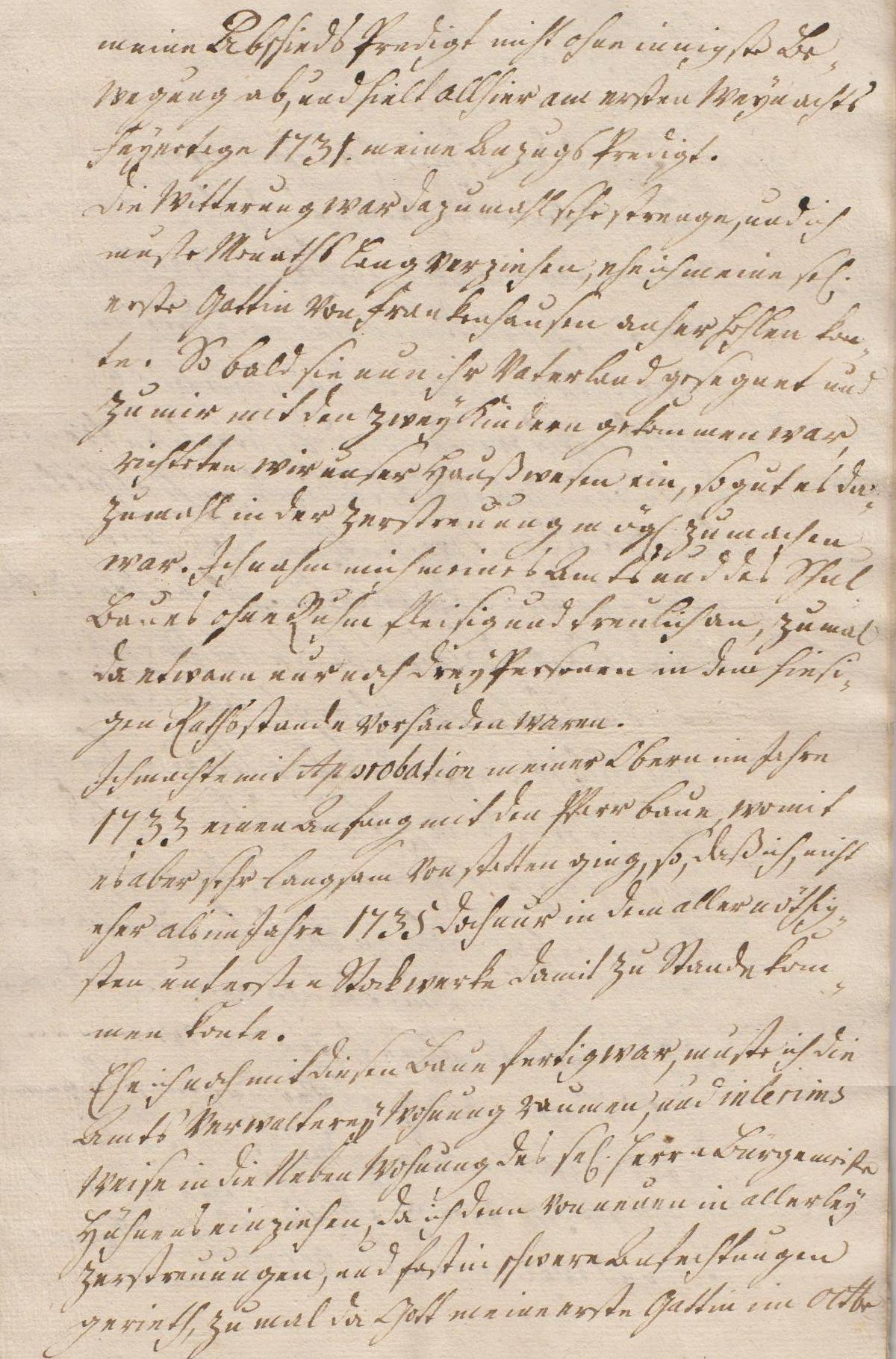 Seite 11 der Leichenpredigt für den Pastor August Wilhelm Reinhart (1696/1770), Bürger der Stadt Heringen an der Helme.